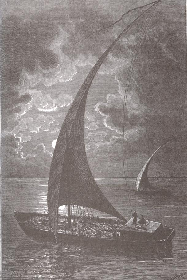 Barche in navigazione nell'Alto Nilo